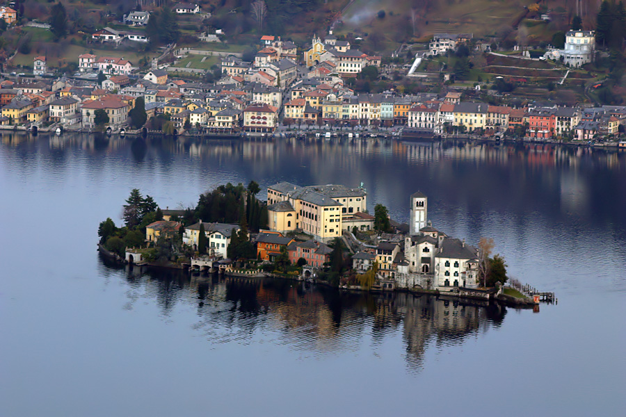 Orta e l'Isola di San Giulio viste dal Santuario della Madonna del Sasso, sulla sponda opposta del lago.